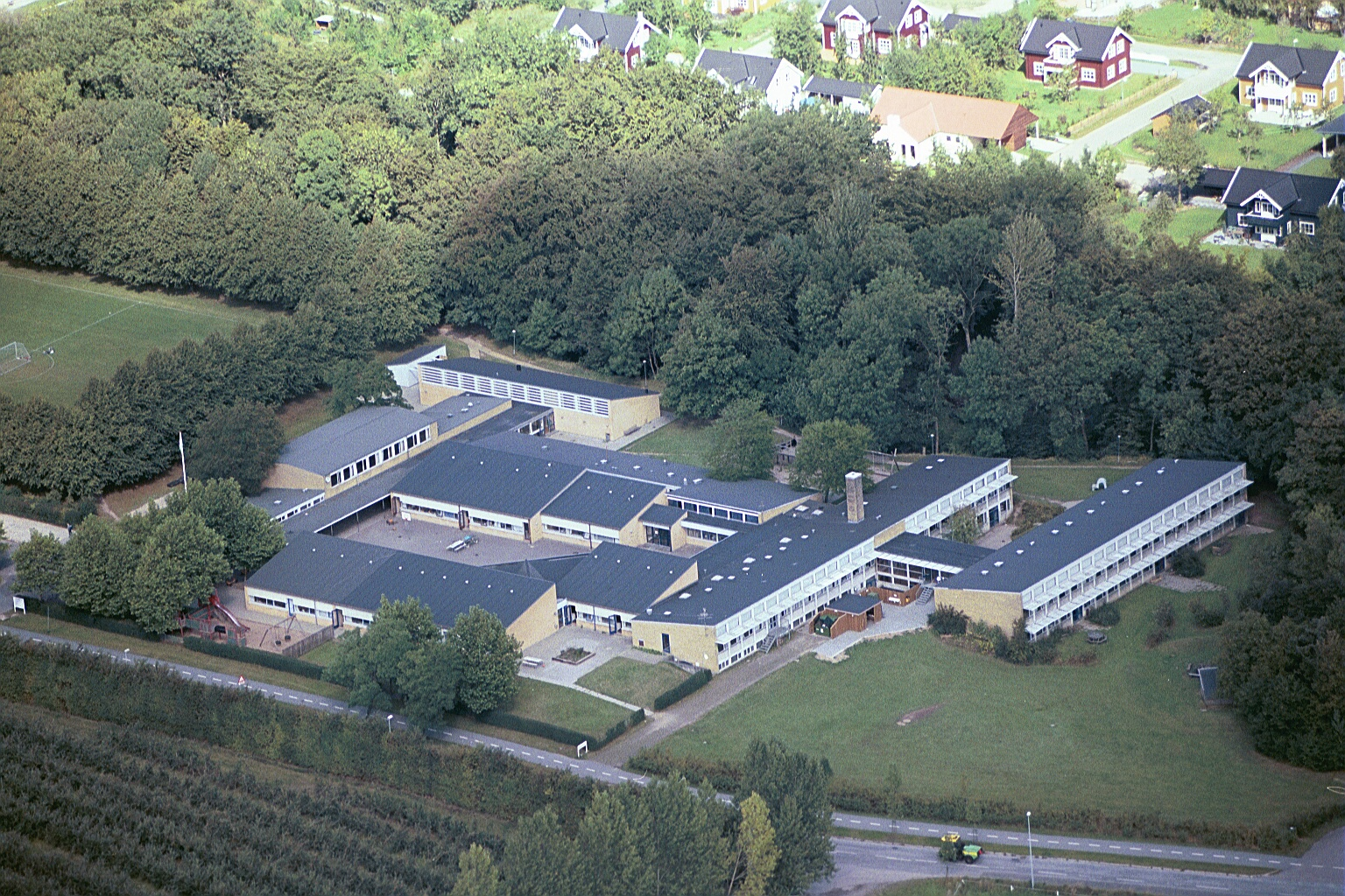 Det er arkitekterne Buhl og Klithøj, der har tegnet Virupskolen.